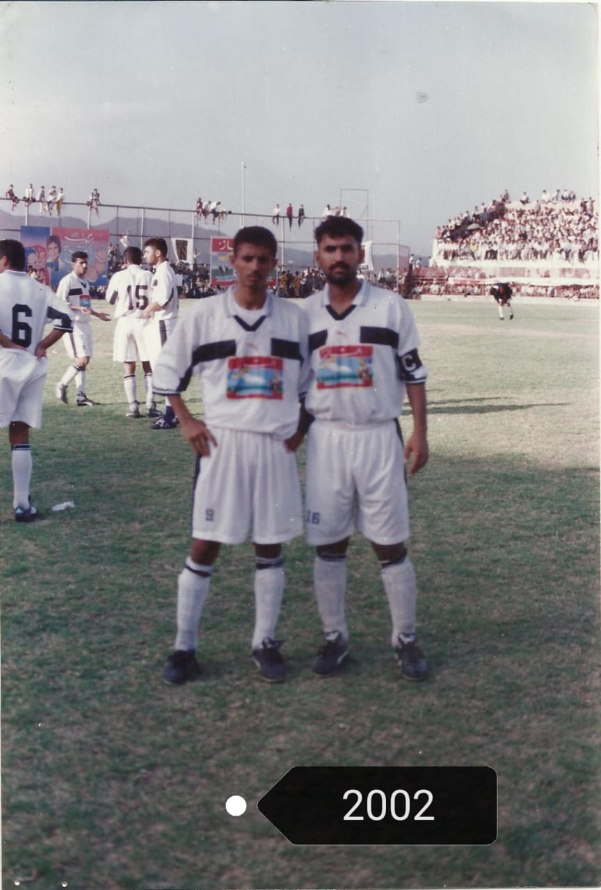 الكابتن اسعد مع اللاعب عصام في مباراة المربع الذهبي التي اقيمت بتعز عام 2000